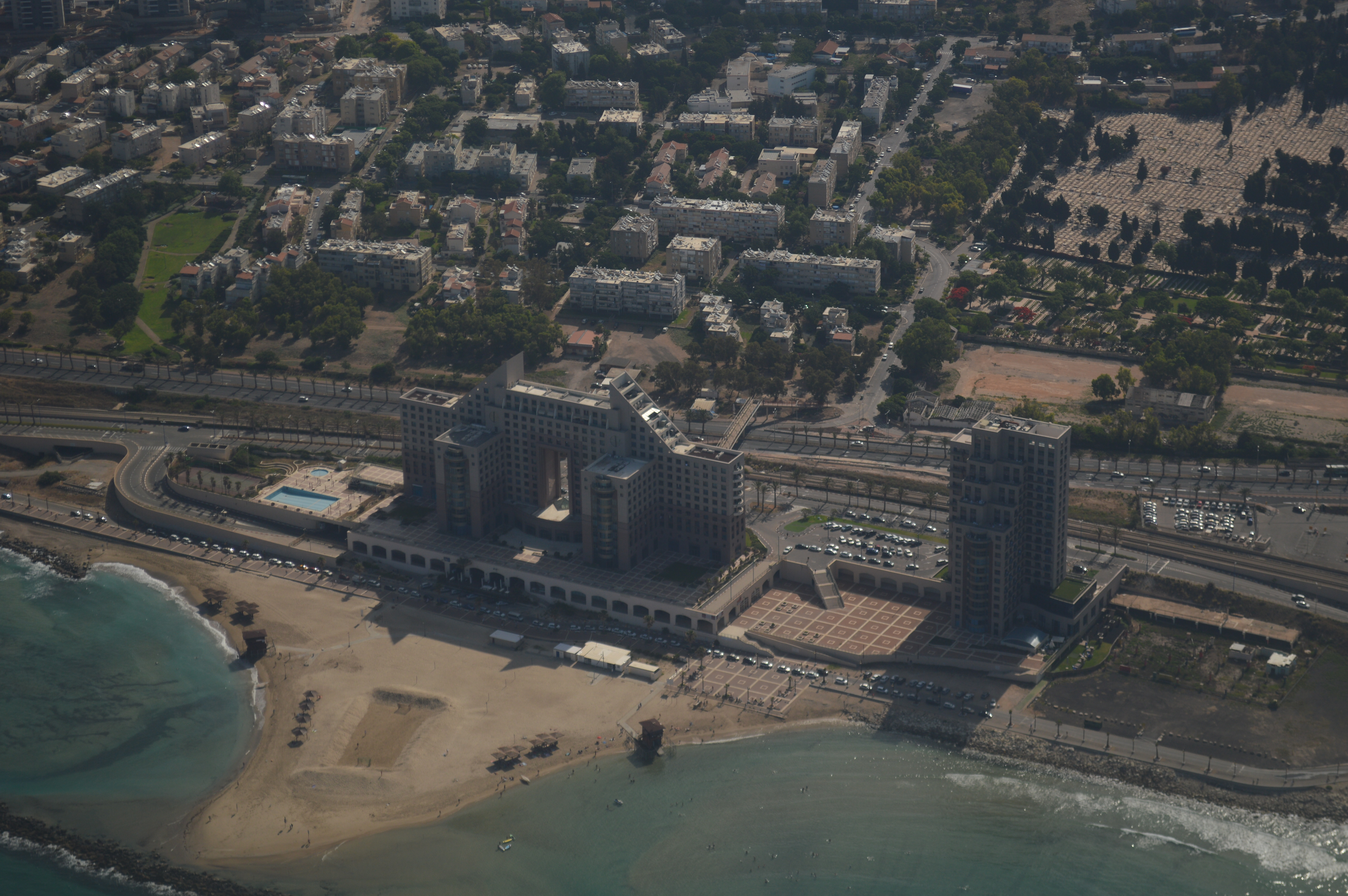 צילום אוויר של מגדלי חוף הכרמל ומלון לאונרדו